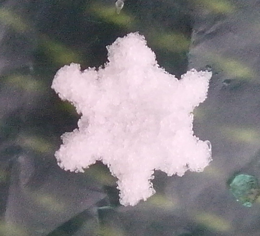 Graupel mit erkennbarer Schneeflockenform